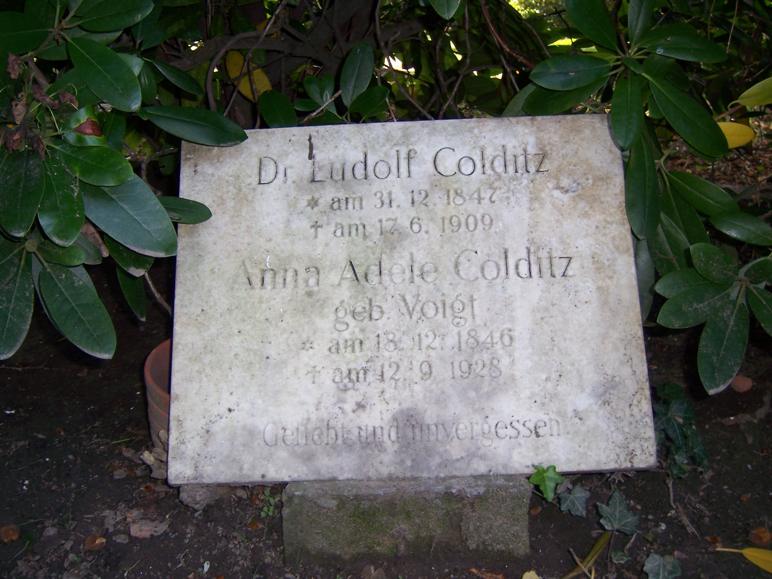 Grabstein Ludolf Colditz auf der Familiengrabstätte